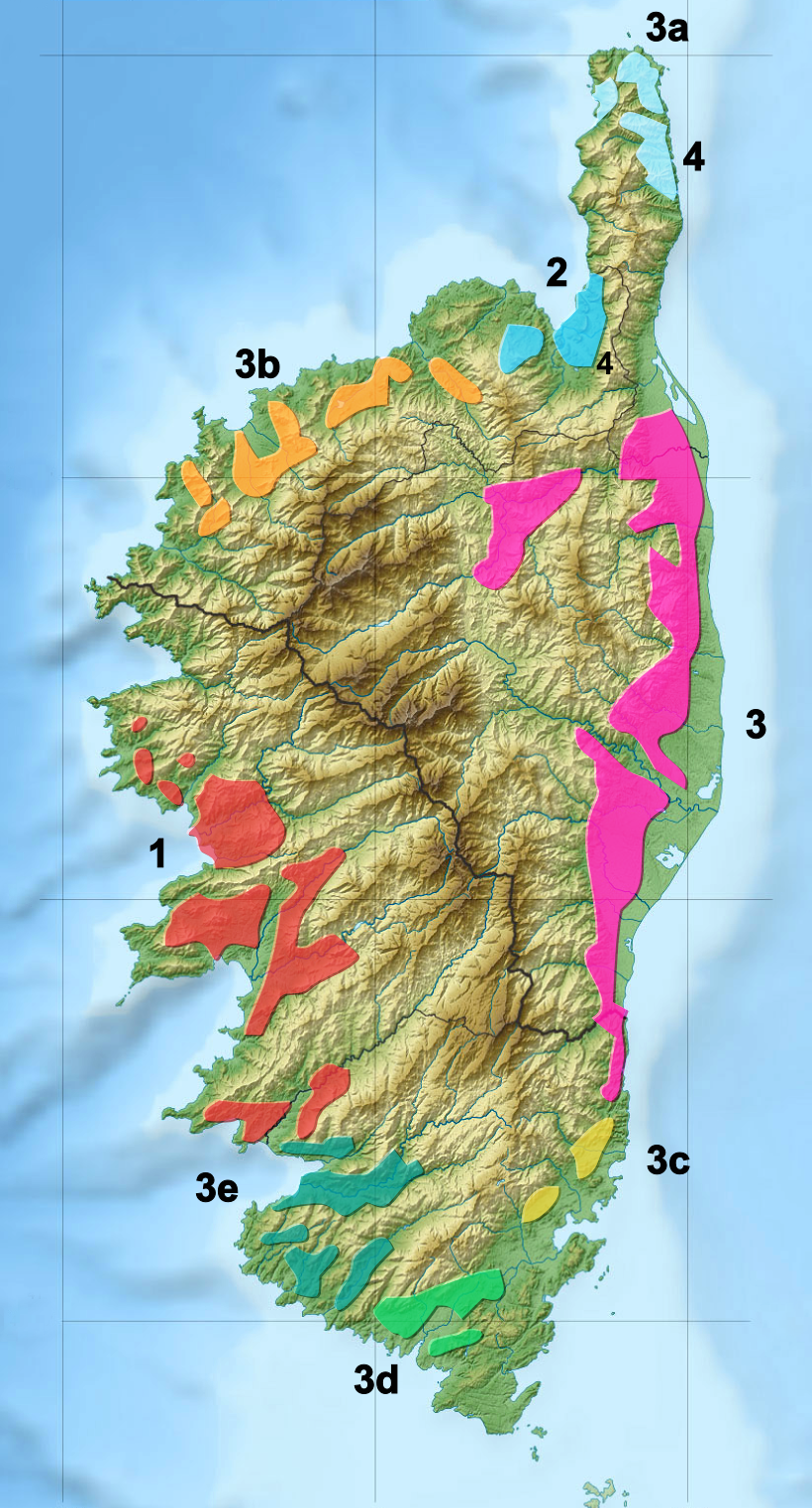 Cartes des vignobles des AOC corses 1 AOC Ajaccio 2 AOC Patrimonio 3 AOC Corse 3a AOC Corse Coteaux du Cap Corse 3b AOC Corse Calvi 3c AOC Corse Porto-Vecchio 3d AOC Corse Figari 3e AOC Corse Sartène 4 AOC Muscat du Cap Corse